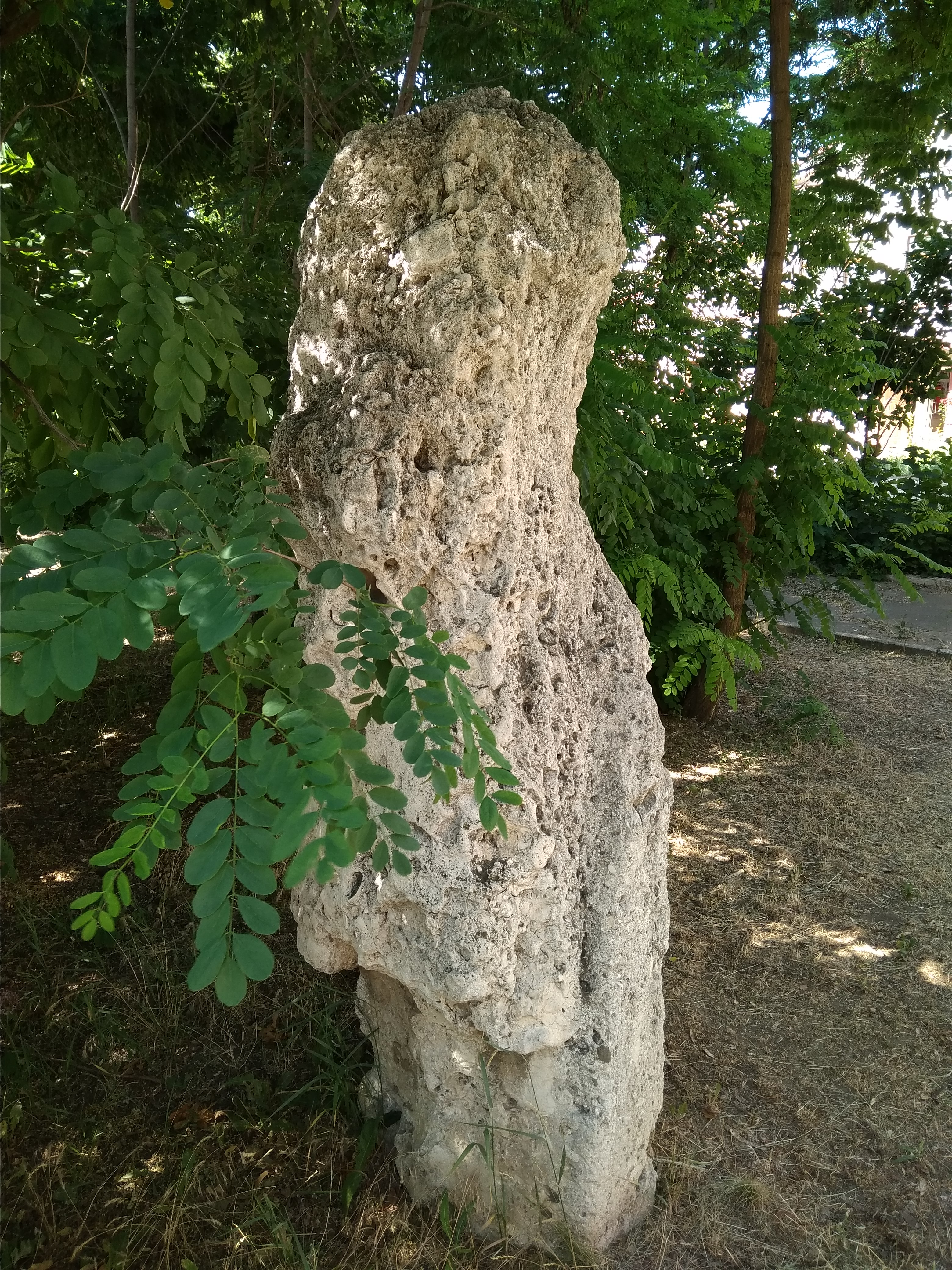 Кам'яна баба, яка була в степу біля Матвіївки